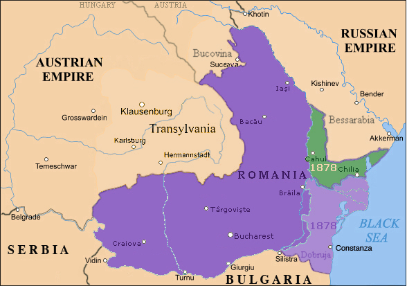 Roumanie 1878: pertes territoriales en vert (en échange de la Dobroudja, entre Danube et Mer Noire).